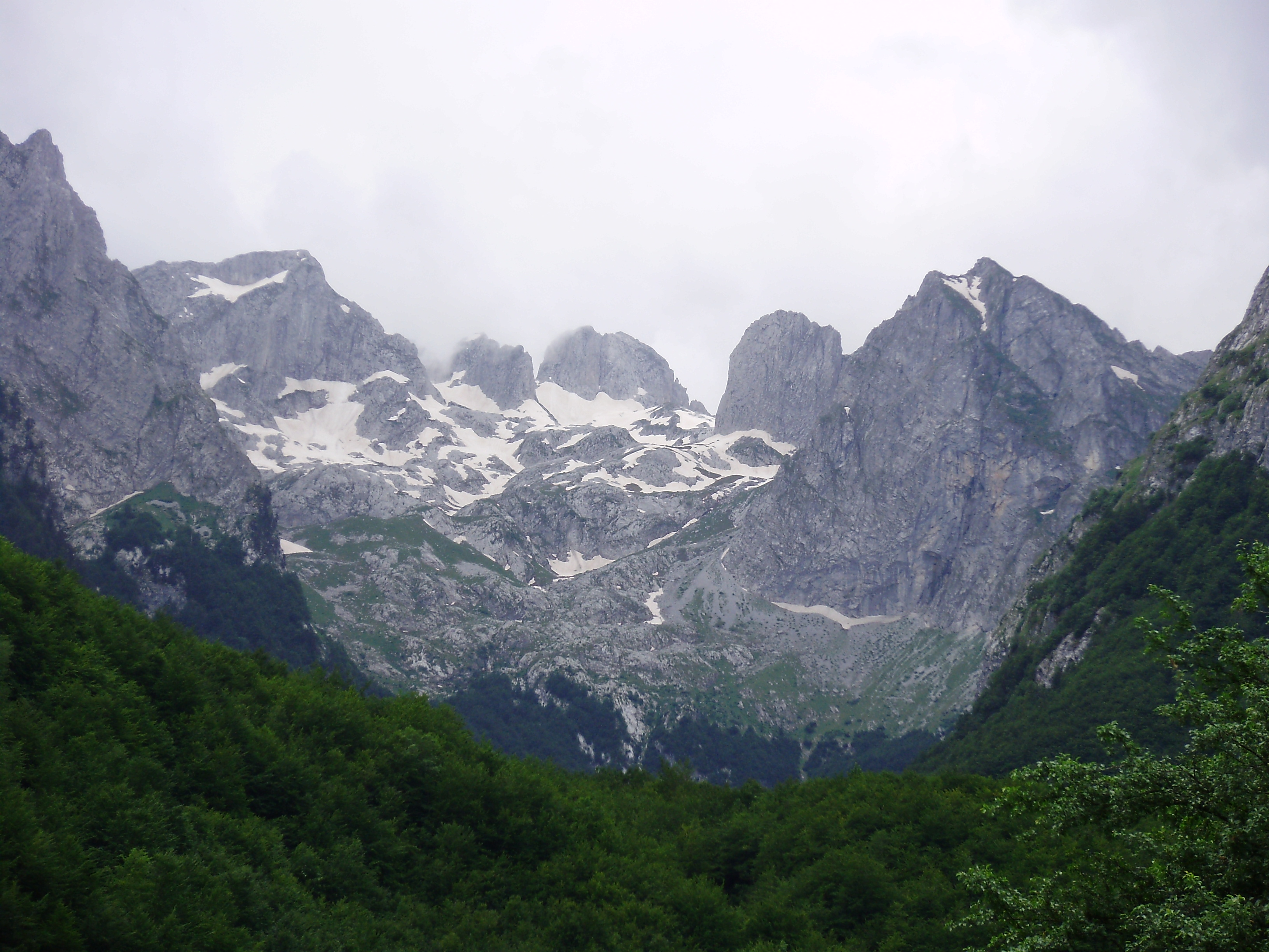 Поглед на Проклетије код Вусања